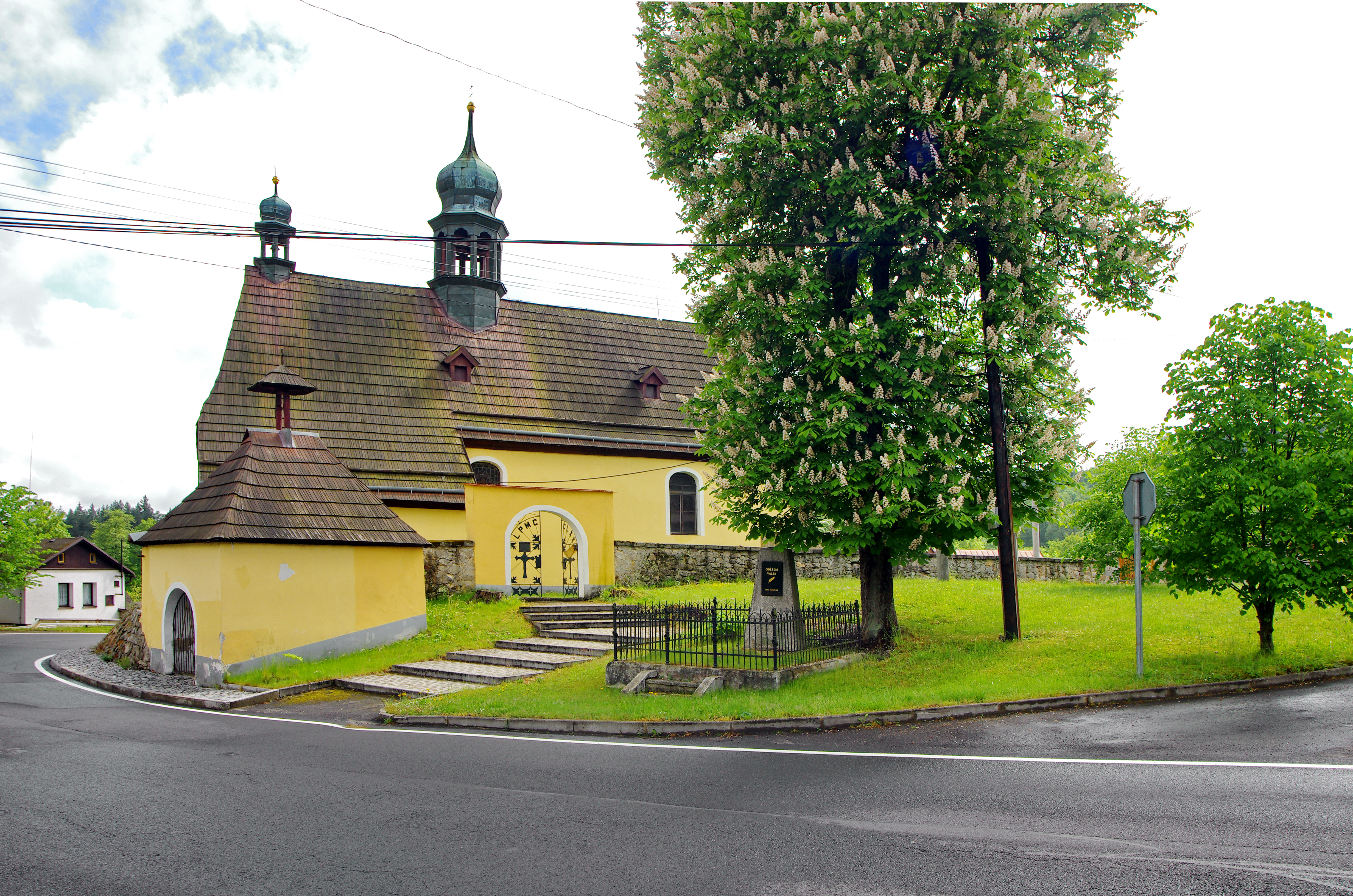 Kostel svatého Erharta, st. 24, Tatrovice.